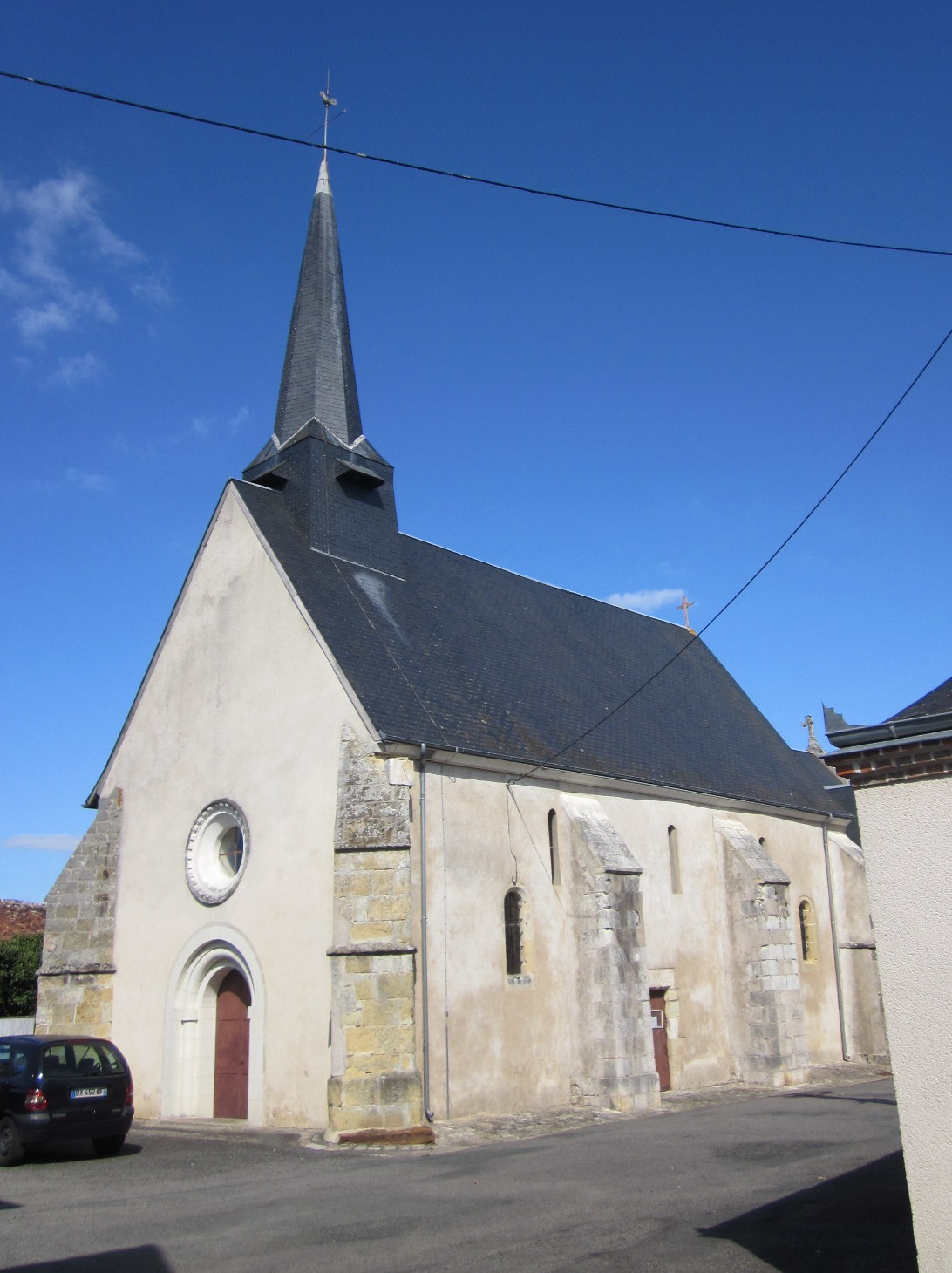 Église de Dun-le-Poëlier, Indre, France